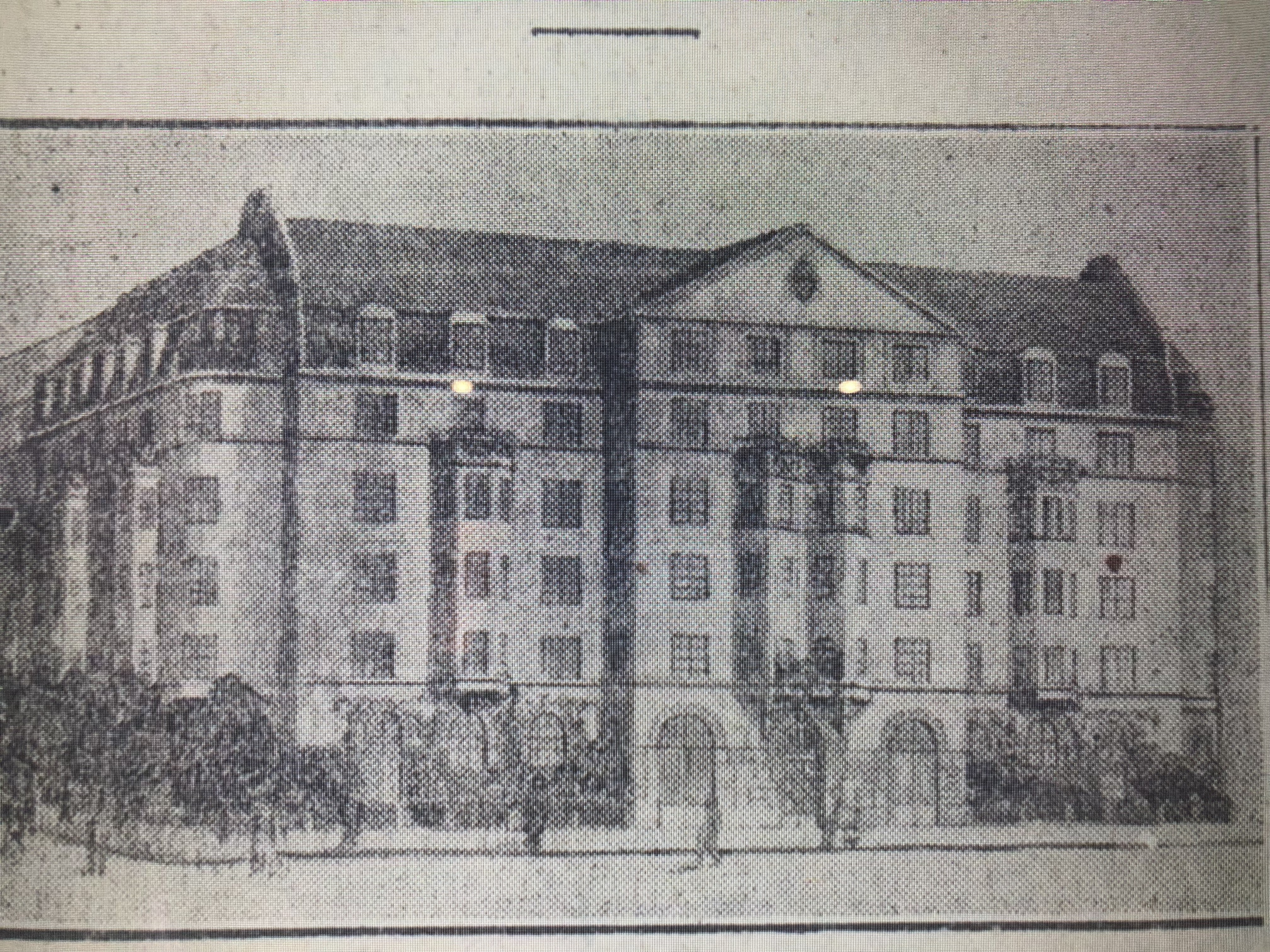 Kvarteret Sländan och dess från mot Norrtull, skissen är skapad av arkitekten Axel Wetterberg (1877-1938) och publicerades i Dagens Nyheter den 28 oktober 1915. Den visar hur kvarteret Sländan skulle utvecklas.